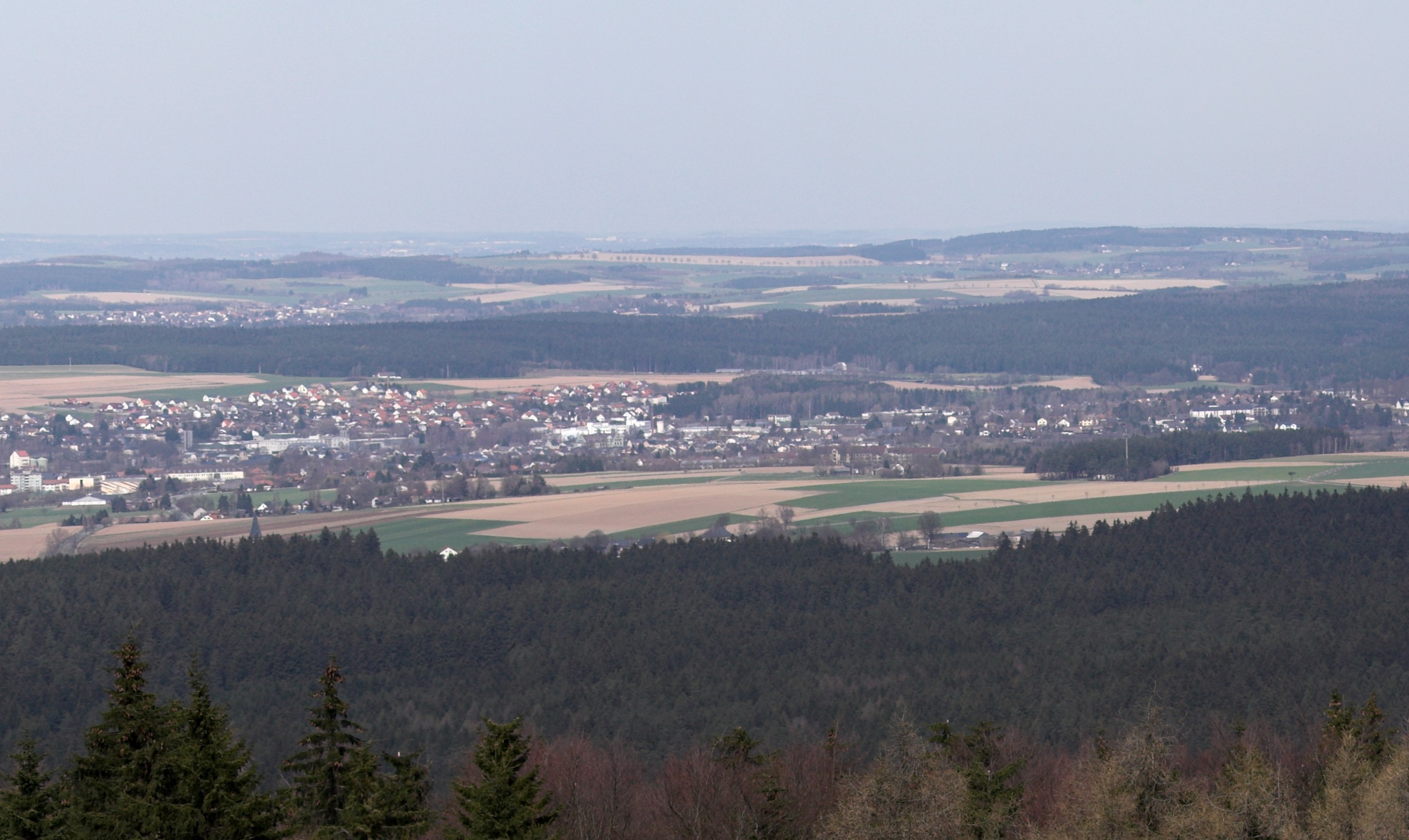 Ansicht der Stadt Rehau vom Kornberg